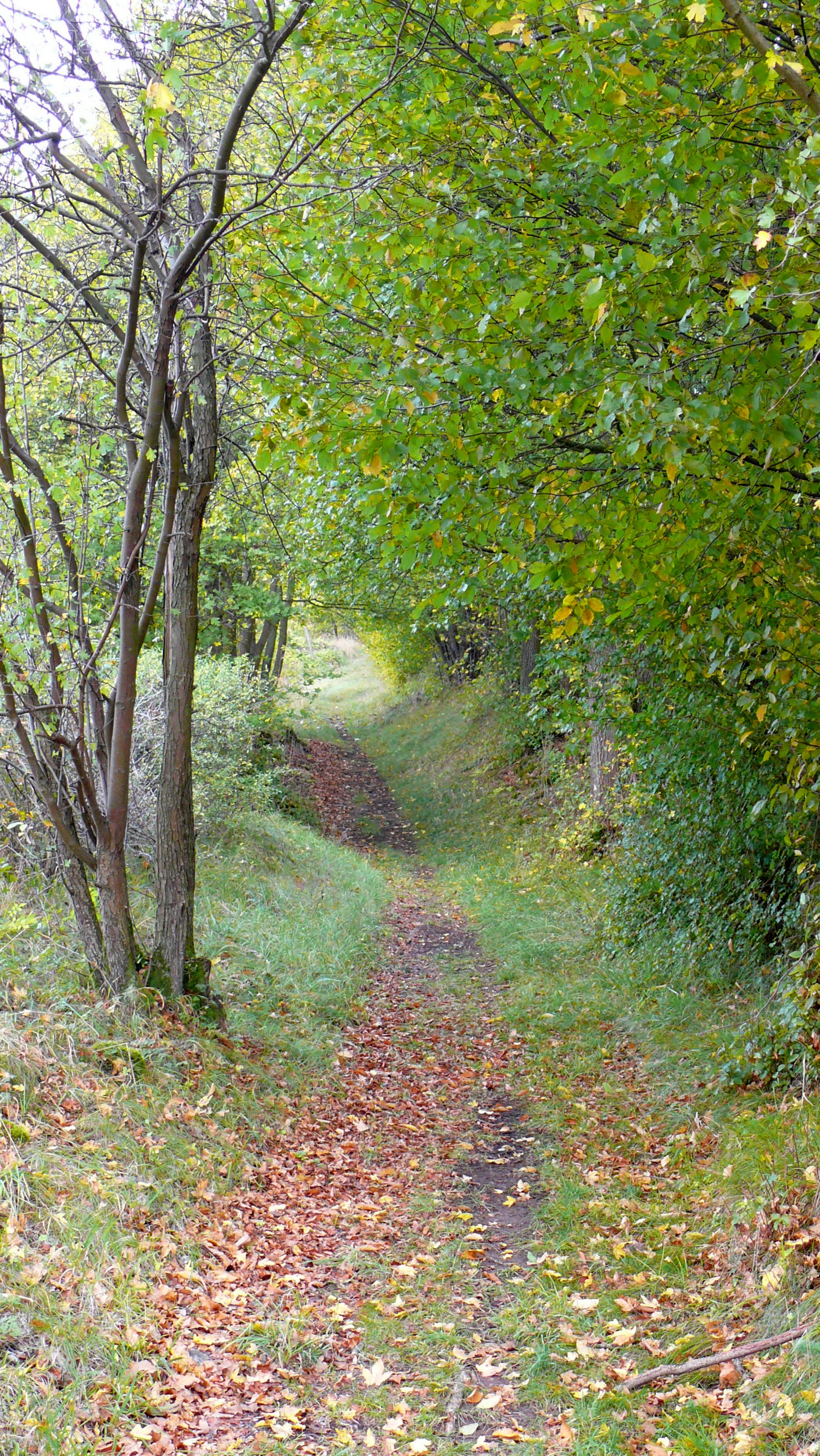 Steiler Weg auf dem Kulturlandschaftspfad Creglingen